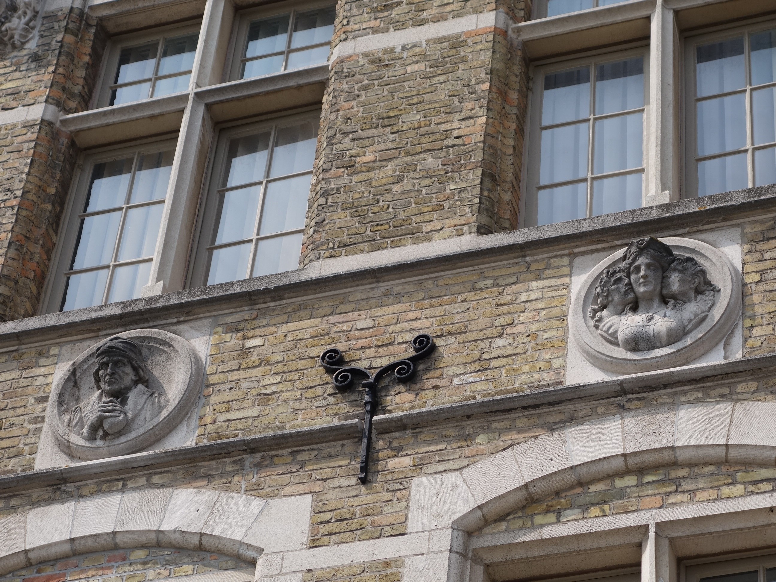 Medaillons van Aloïs de Beule op het Kasselrijhof, Ieper (Zeven Hoofdzonden: Hebzucht en Wellust